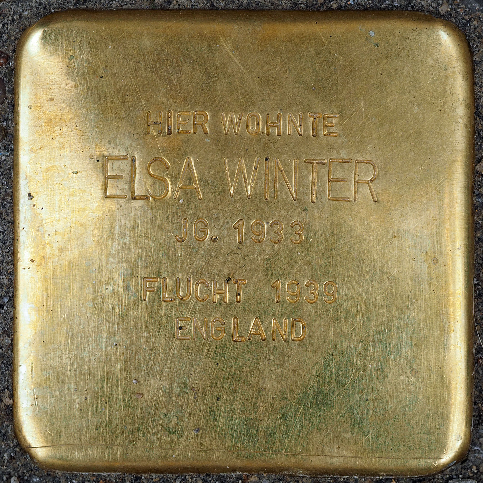 Stolpersteine Kempen: Winter, Elsa